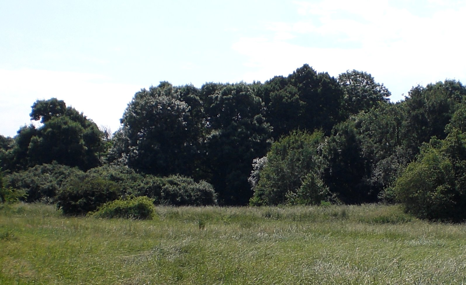 Erhebung in der Kreuzhorst bei Magdeburg, Standort des ehemaligen Guts Kulenhagen